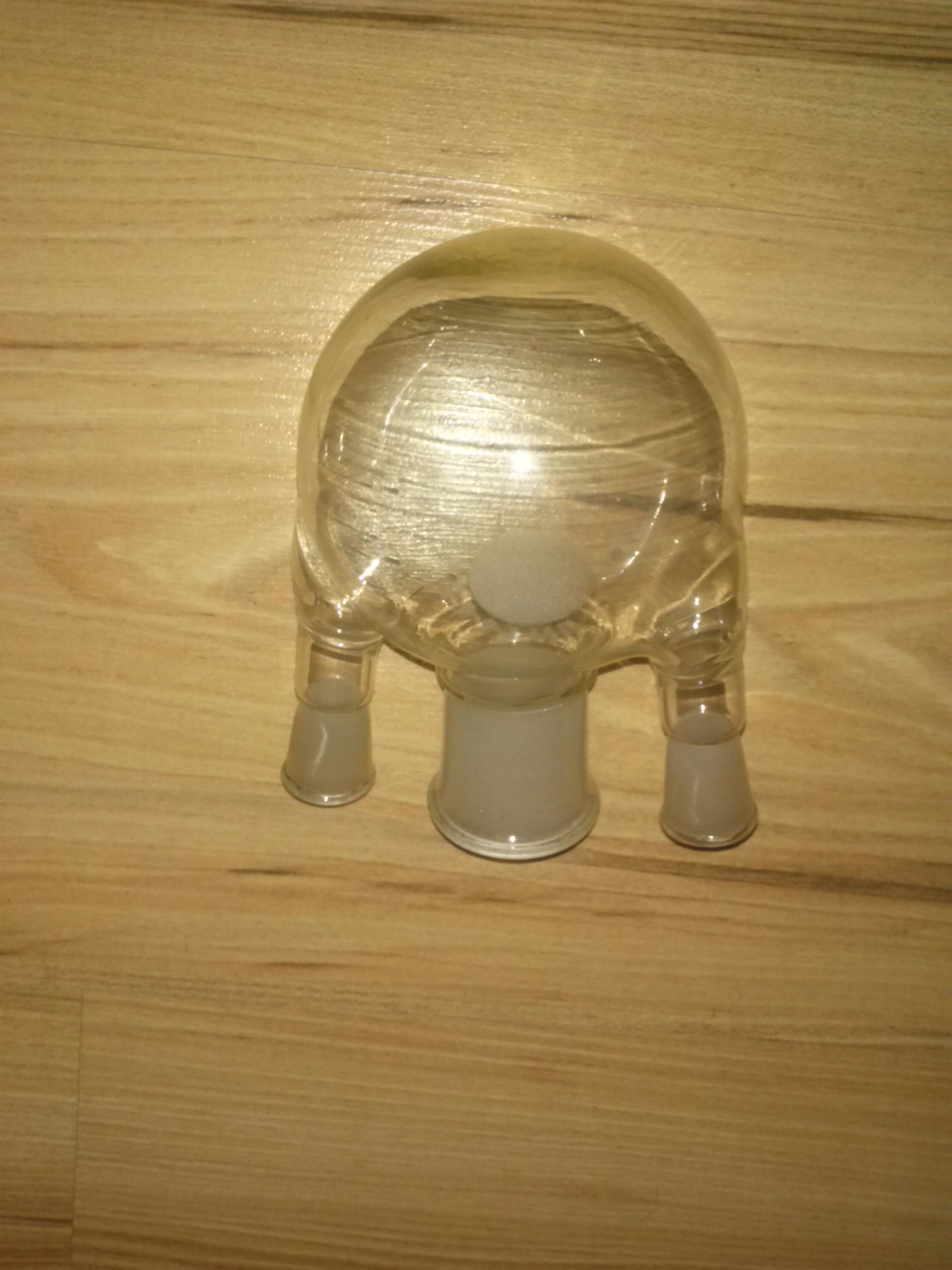 Kolba trójszyjna 250ml